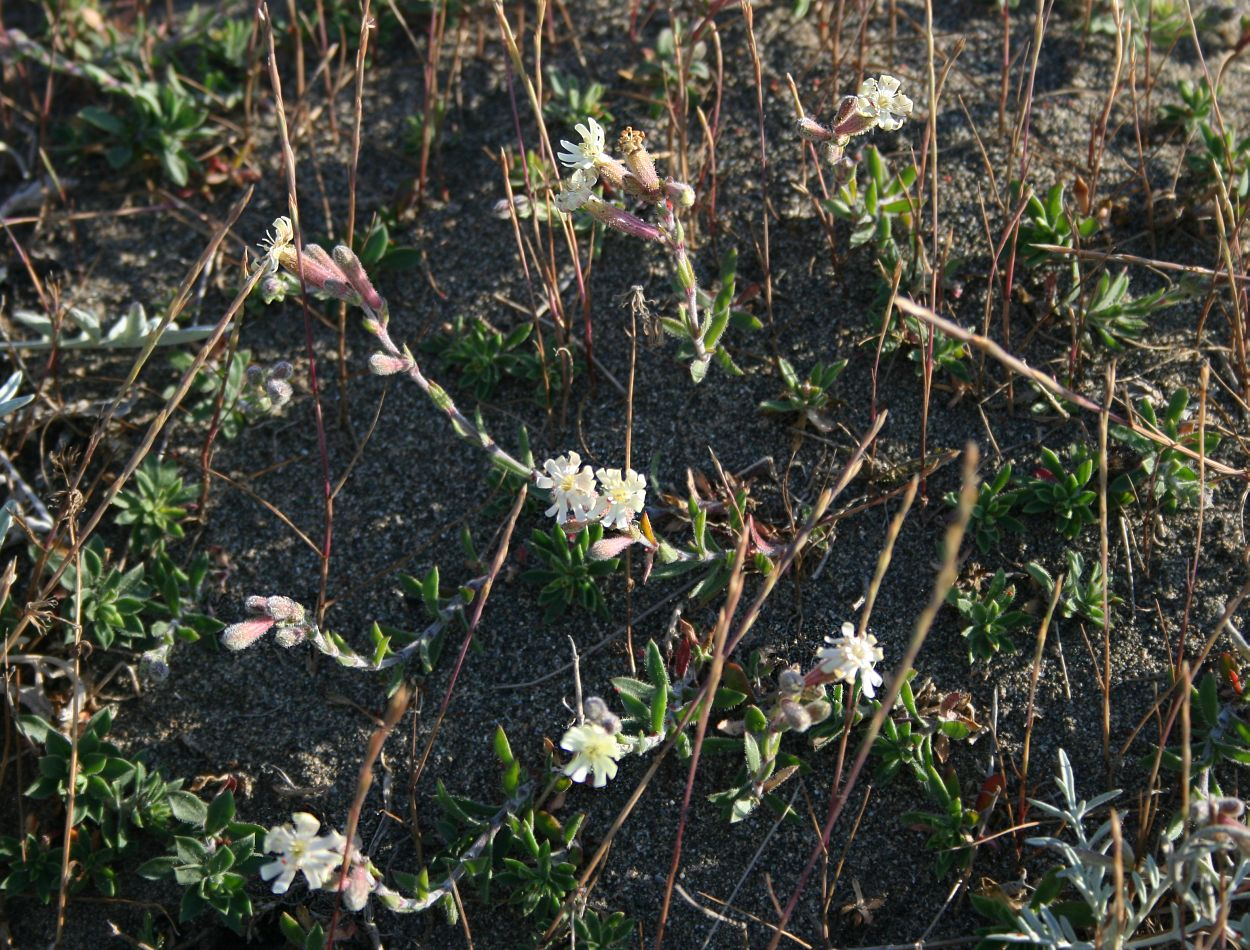 Silene sangaria, Nelkengewächse (Caryophyllaceae) - Türkei/Türkiye/Turkey: Sakarya Prov./Sakarya ili, Sandküste des Schwarzen Meers (Karadeniz) bei Kocaali E Karasu